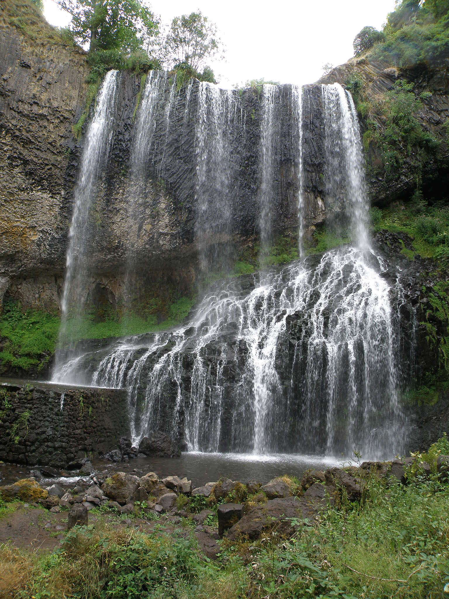 Cascade de la Beaume, sur la riv. la Beaume, dans la commune de Solignac-sur-Loire, dép. de la Haute-Loire, France (région Auvergne).